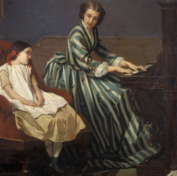 Muuseumikogu Maalikogu Autor Köler, Johann Olemus maal Kunstiese Säilivus rahuldav